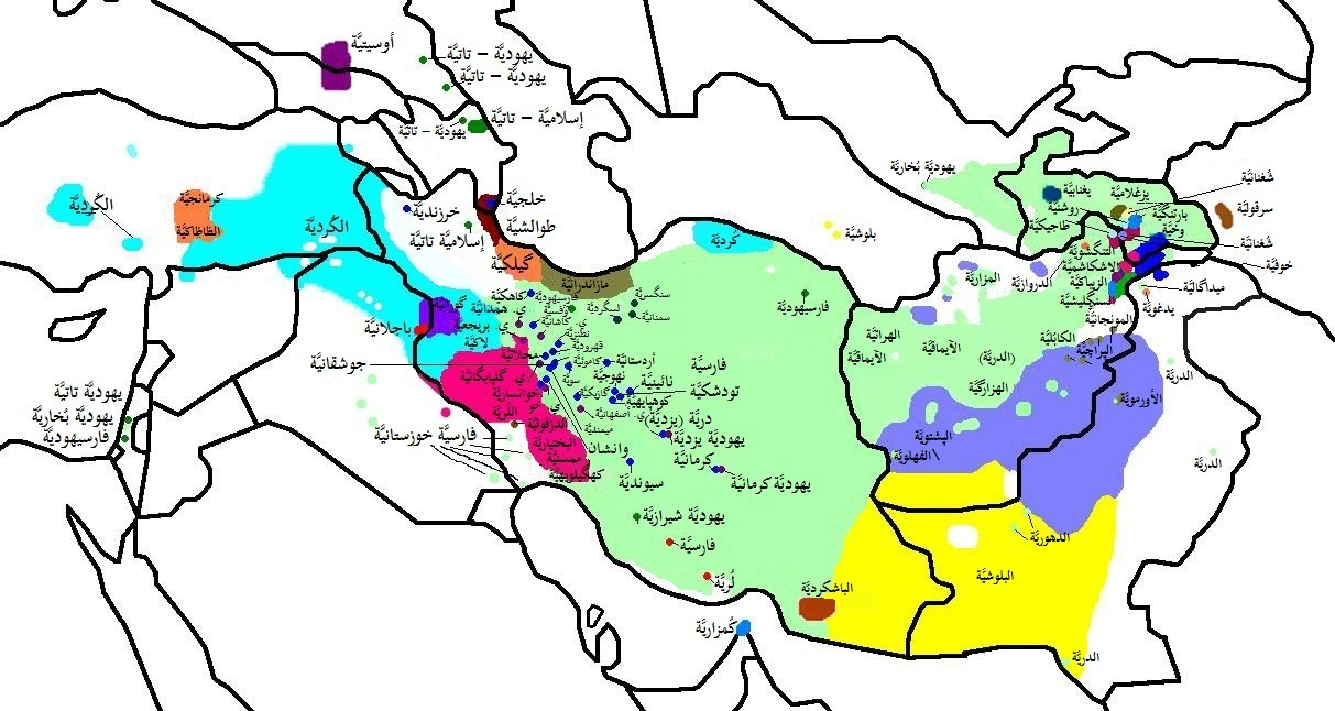 خارطة لُغويَّة لِلُغات الإيرانيَّة الُعاصرة: الفارسيَّة (أخضر)، والبشتونيَّة (بنفسجي) والكُرديَّة (الأُردُوازي)، واللُريَّة (أحمر)، والبلوشيَّة (أصفر)، إلى جانب لُغات بعض المجموعات العرقيَّة المحليَّة الأصغر حجمًا (باللُغة العربيَّة)